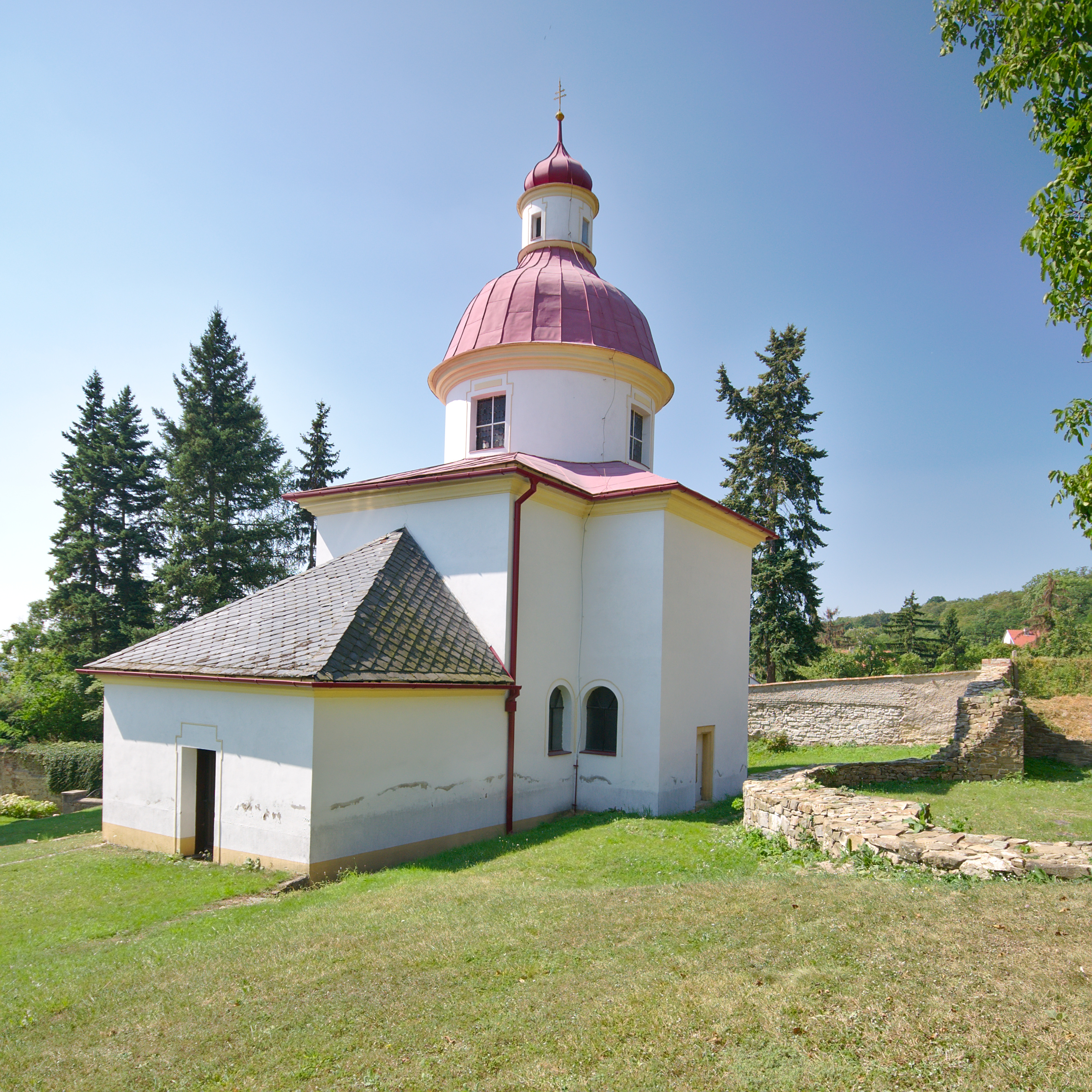 Kaple svaté Anny, Pustiměř, okres Vyškov